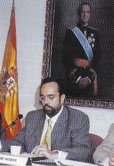 Guillermo Ortega en 2001